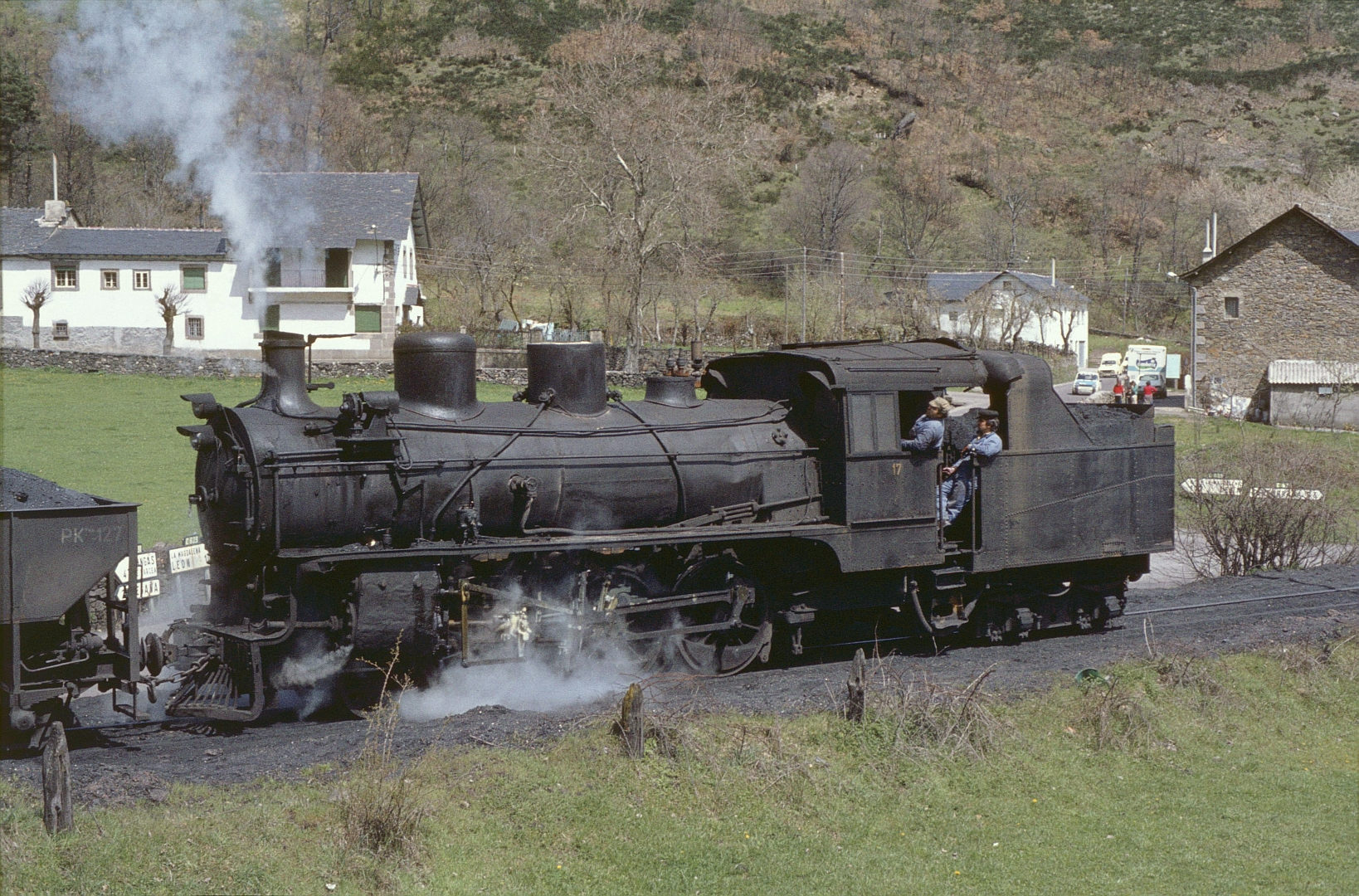 La 132 T Engerth N°17 de retour de Caboalles, arrive à Villablino au mois d'avril 1983.